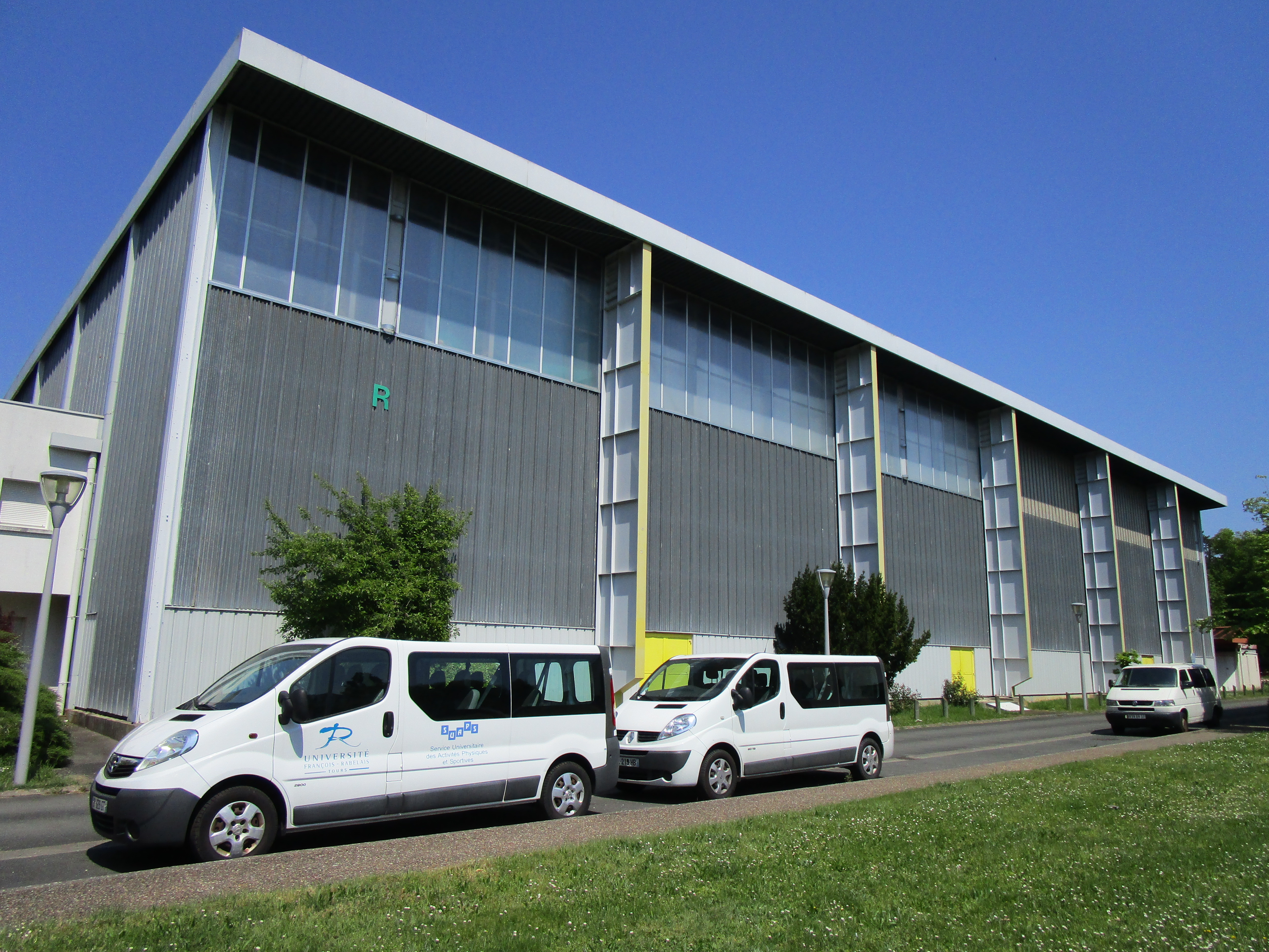 Bâtiment du service universitaire des activités physiques et sportives (SUAPS), dans le campus de Grandmont de Tours.